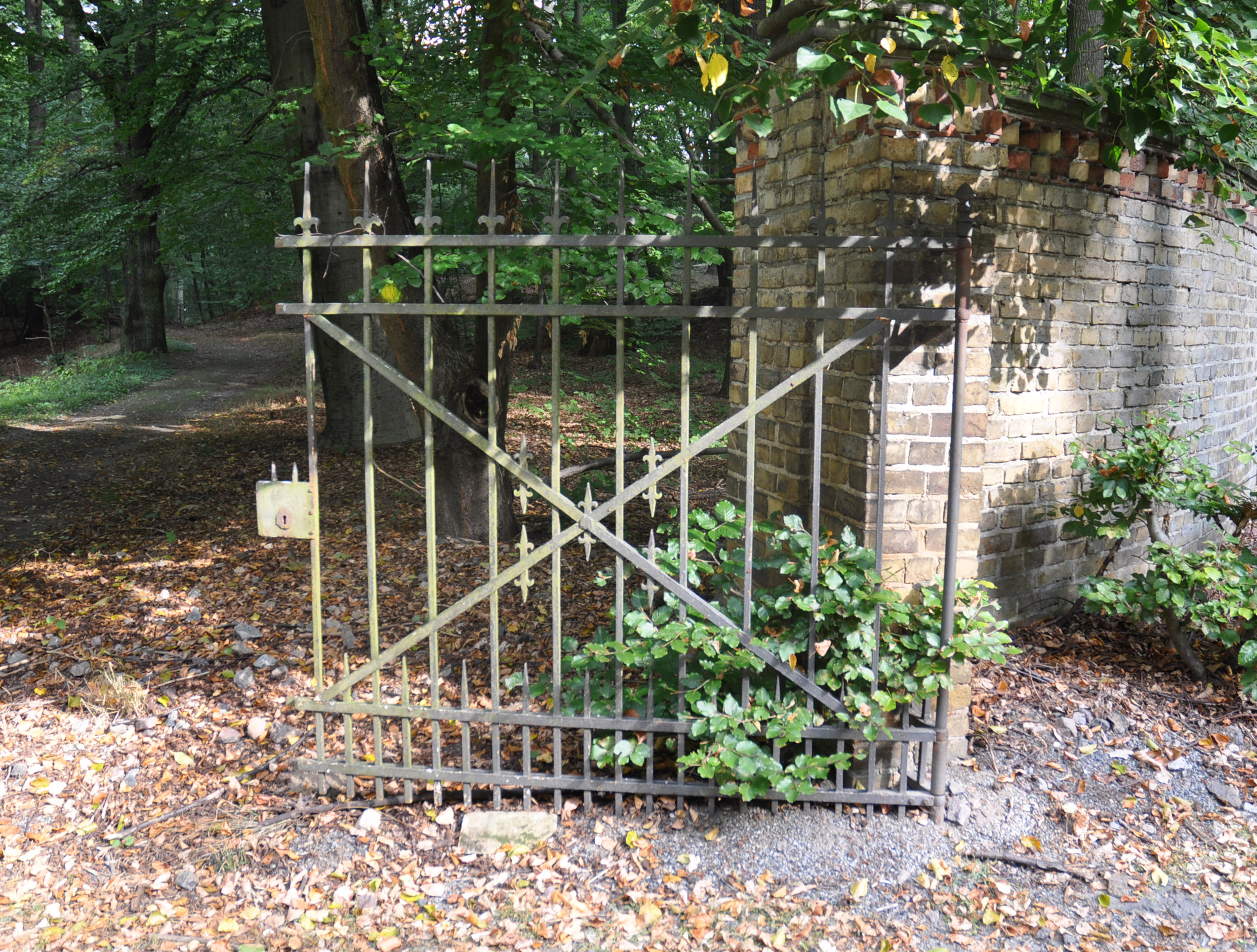 Torflügel, wie er auch am Obertor und den Böttcherbergtoren gestaltet war